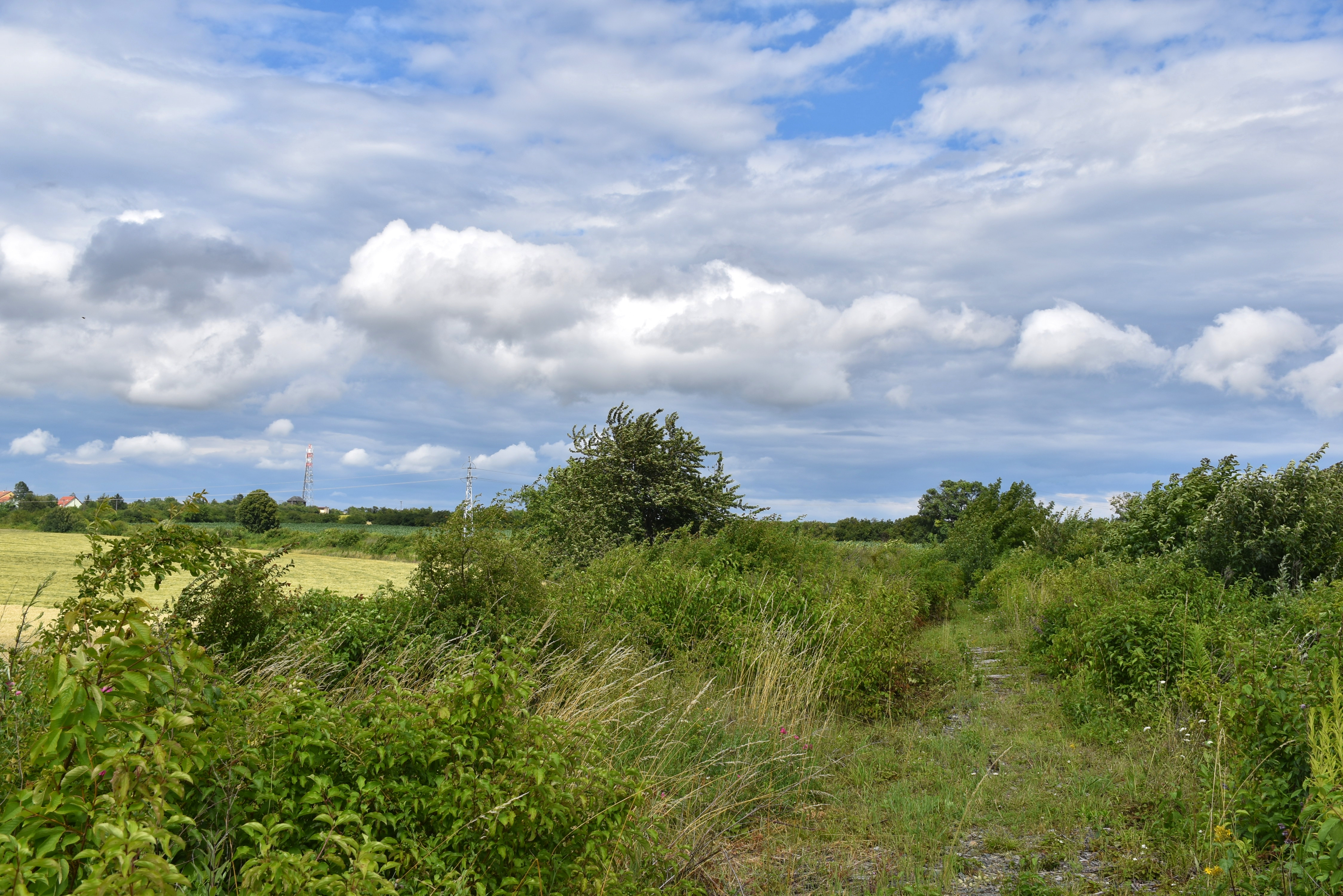 Současný stav tramvajové trati kousek od Líšně.